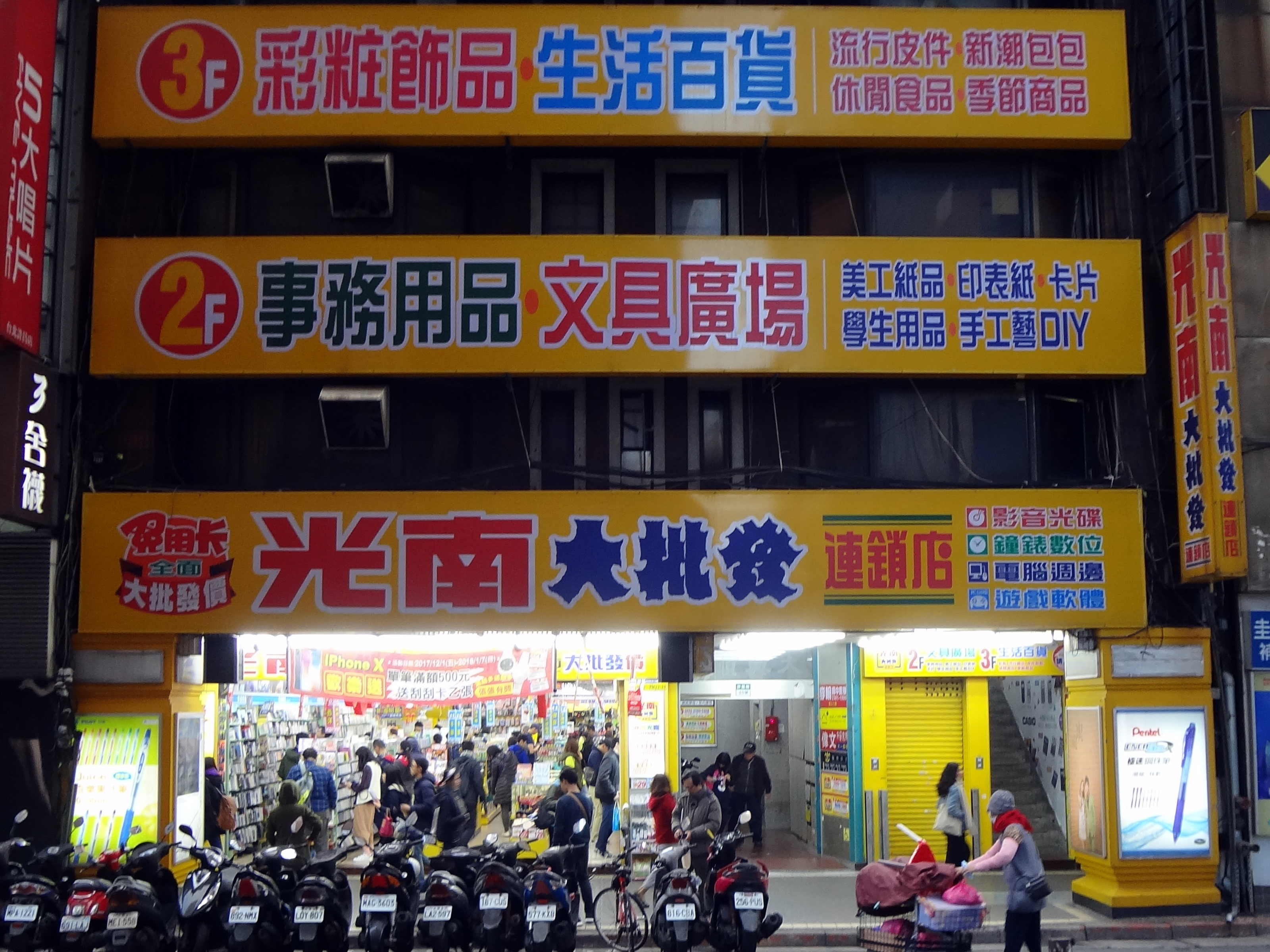 光南大批發連鎖店臺北許昌店，地址：臺北市中正區許昌街40號1至3樓。